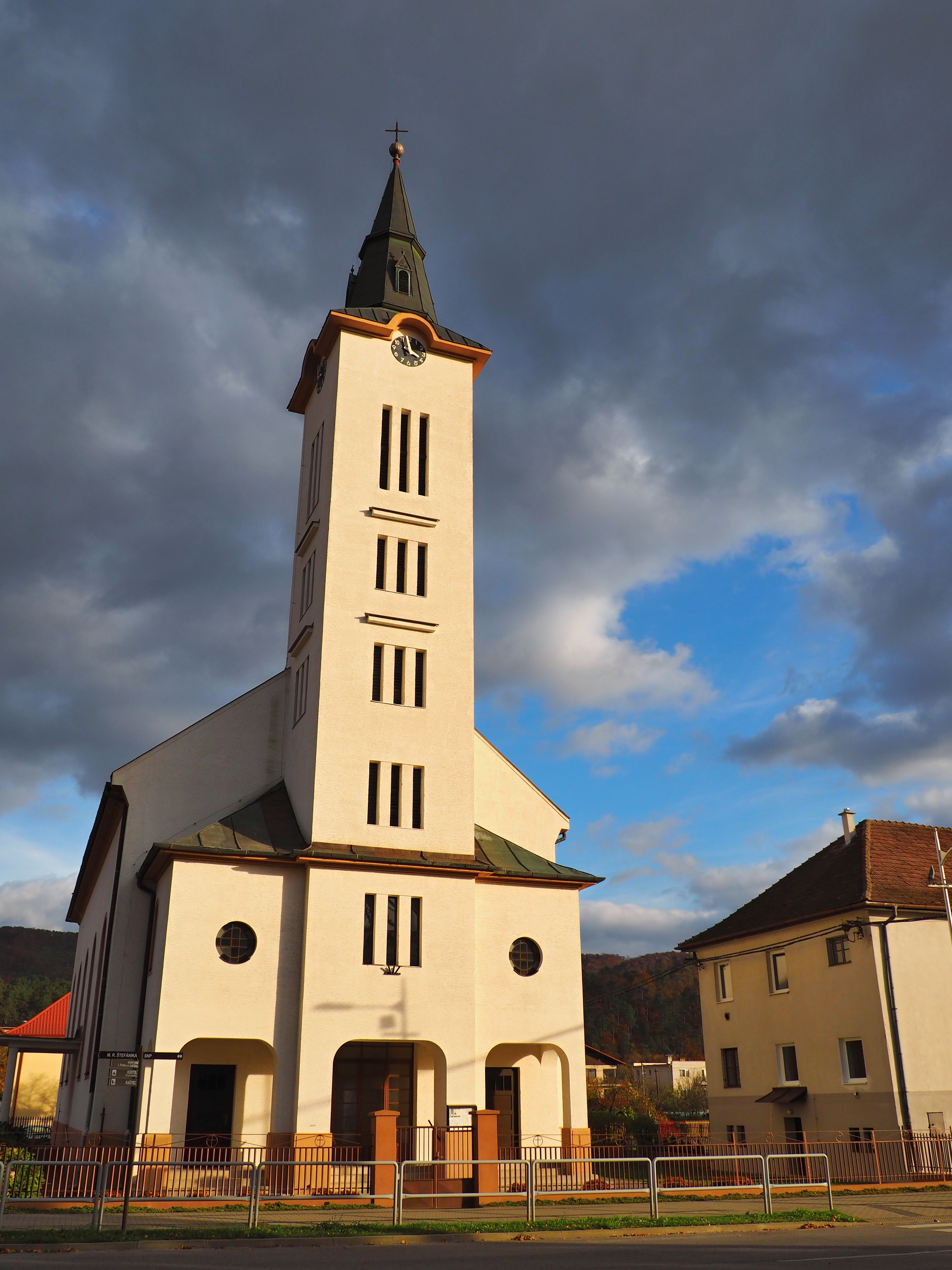 Evangelický kostel